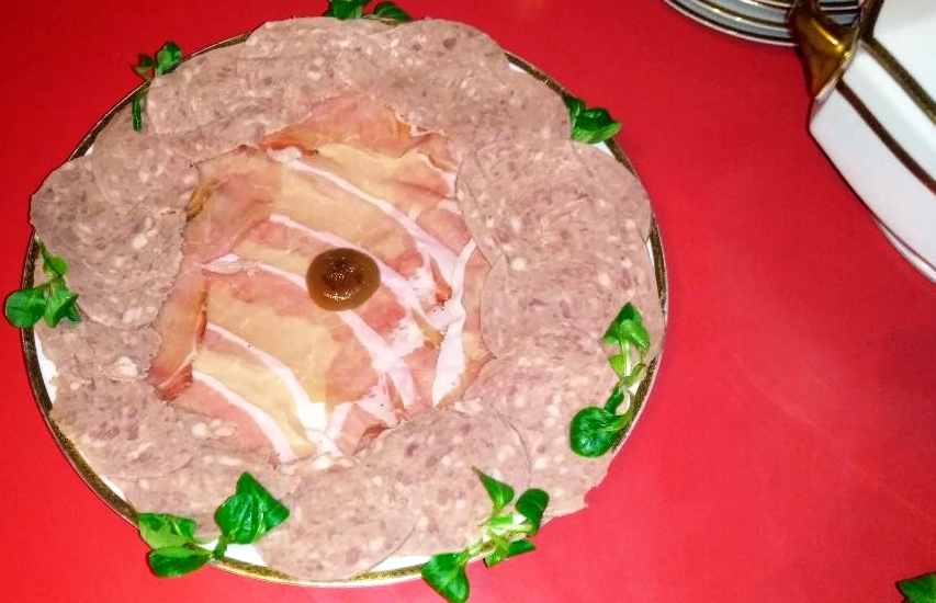 Mortadella di fegato cotta impiattata con altri salumi a decorata con valerianella